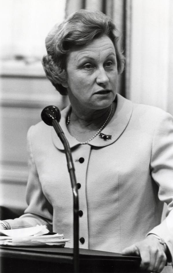 Mevrouw Stoffels-Van Haaften(VVD) opende als voorzitter een congres over arbeid van de vrouw buiten het eigen gezin. Den Haag, Nederland, 3 maart 1967.